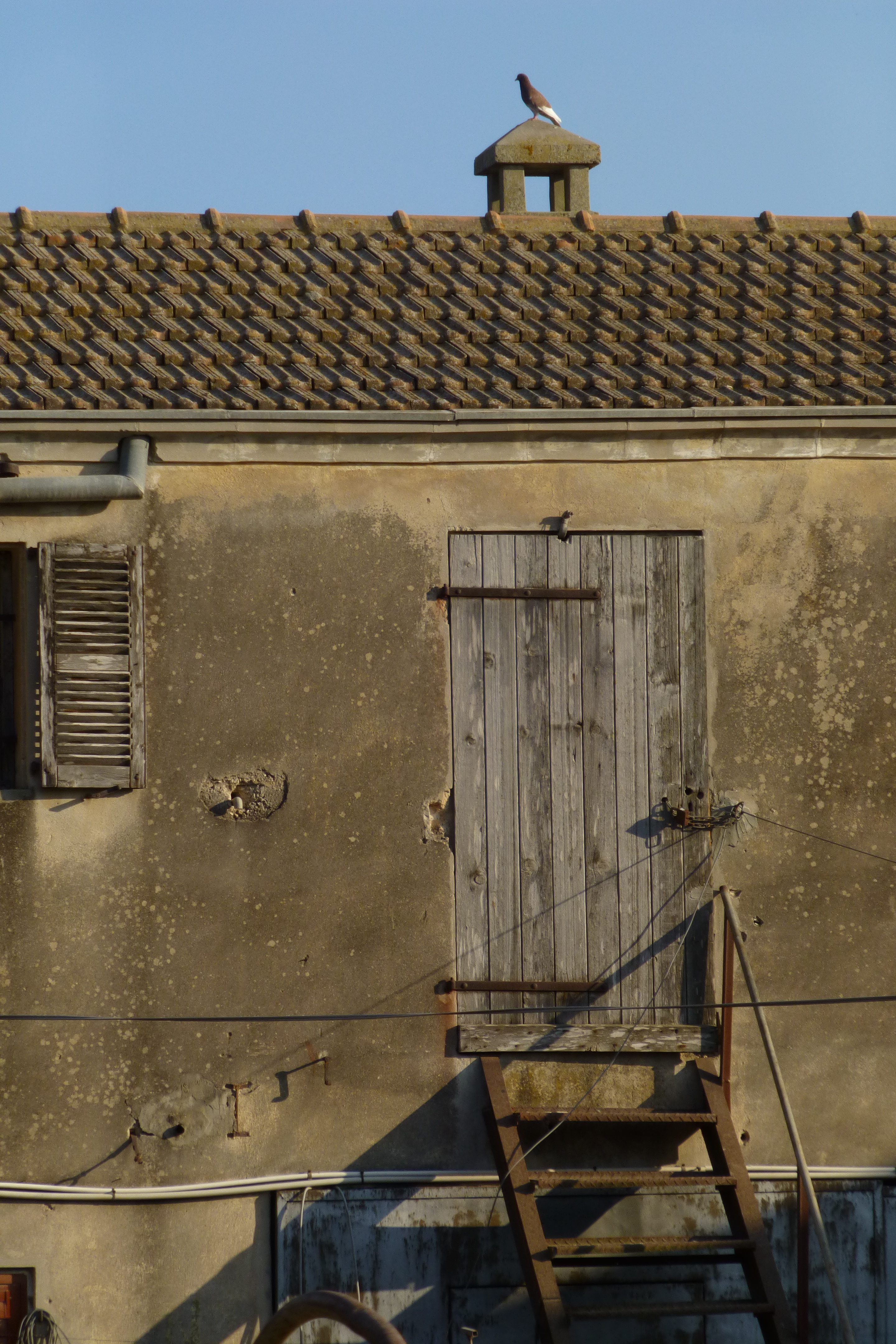 ראשוני המתיישבים באתר היישוב אלוני אבא היו בני הדור השני של תנועת הטמפלרים הגרמנים, אשר הקימו במקום בשנת 1907 מושבה חקלאית קטנה ושמה "ולדהיים".